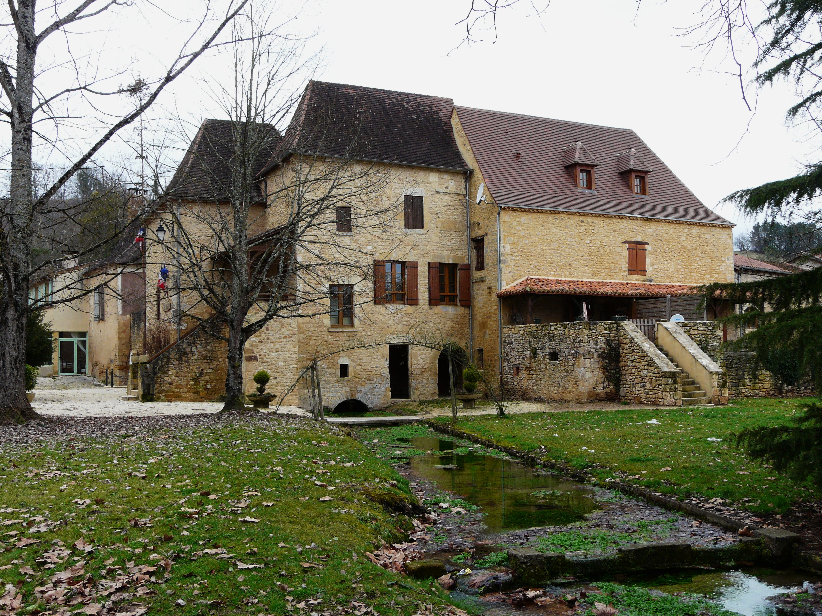 Mairie de Sagelat, Dordogne, France